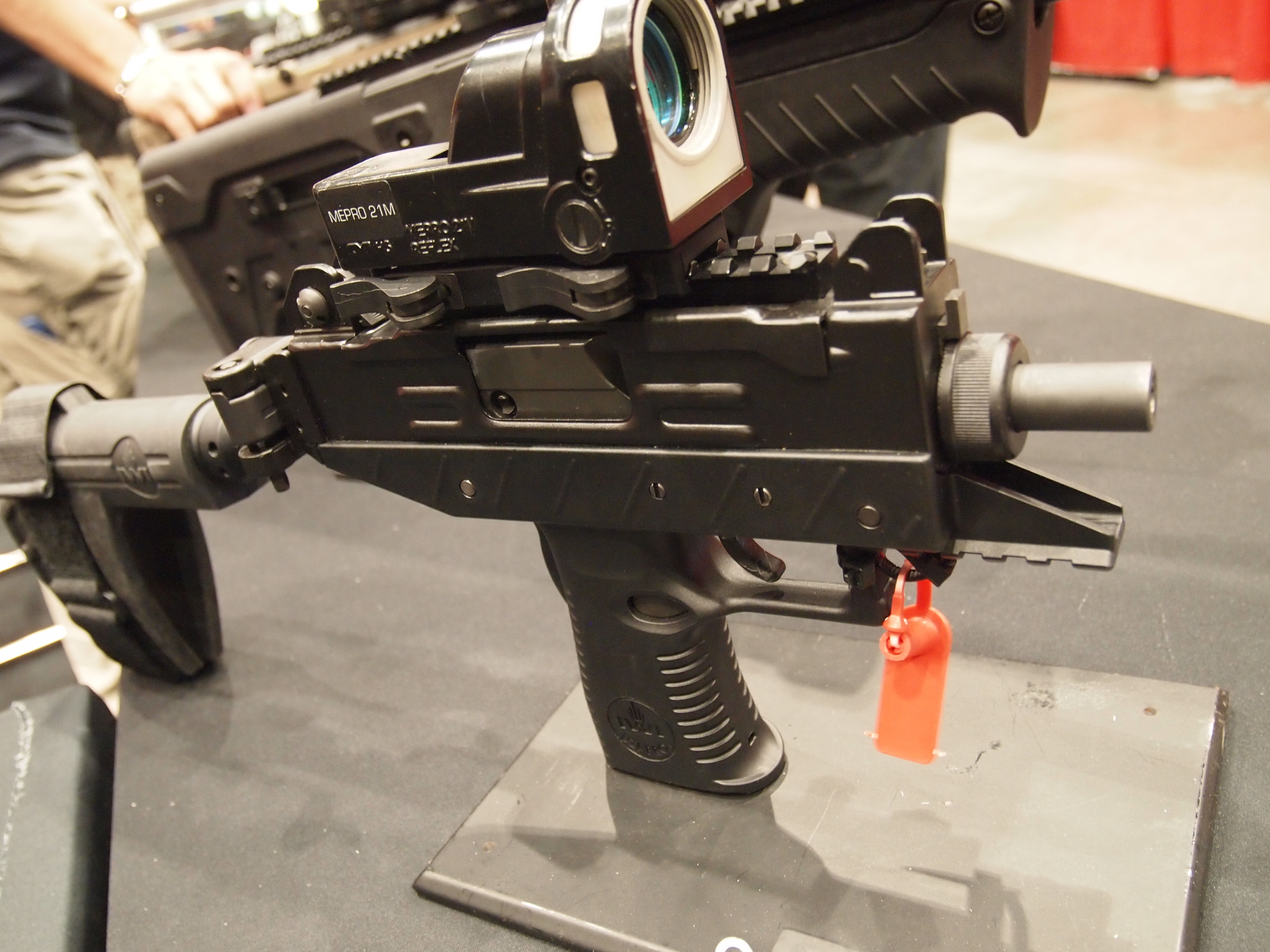 UZI PROサブマシンガン